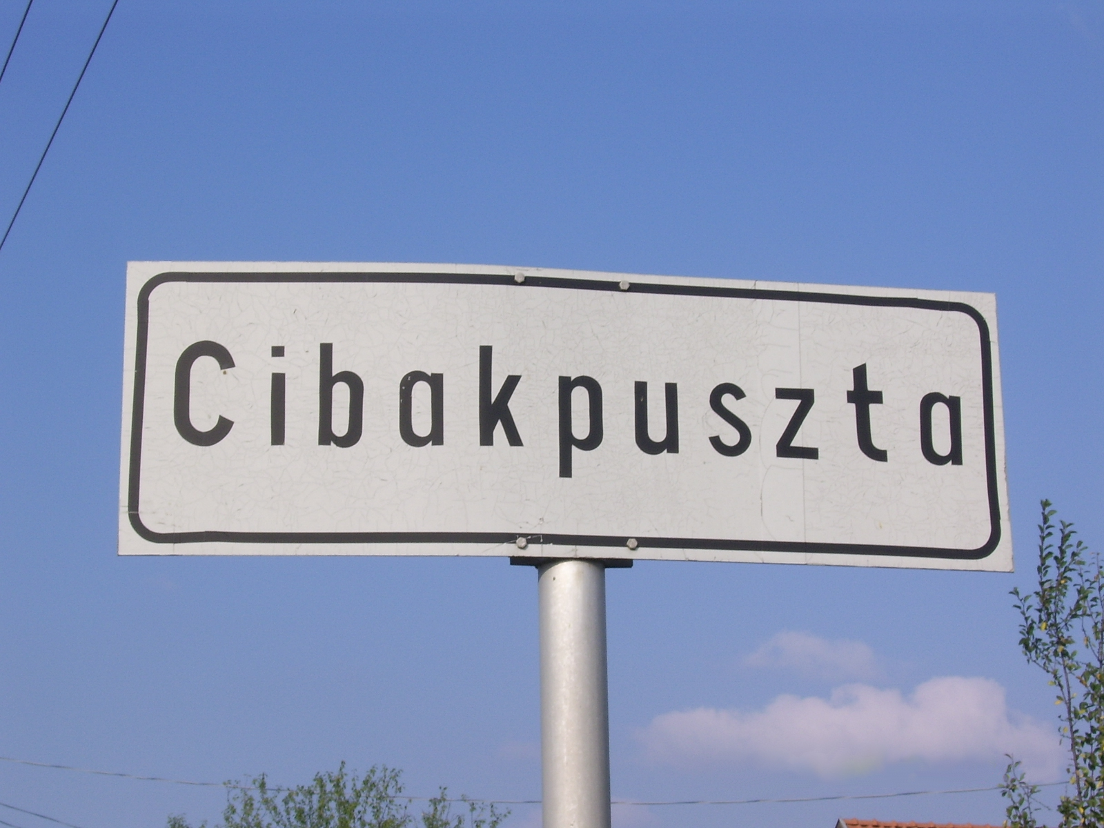 Cibakpuszta tábla